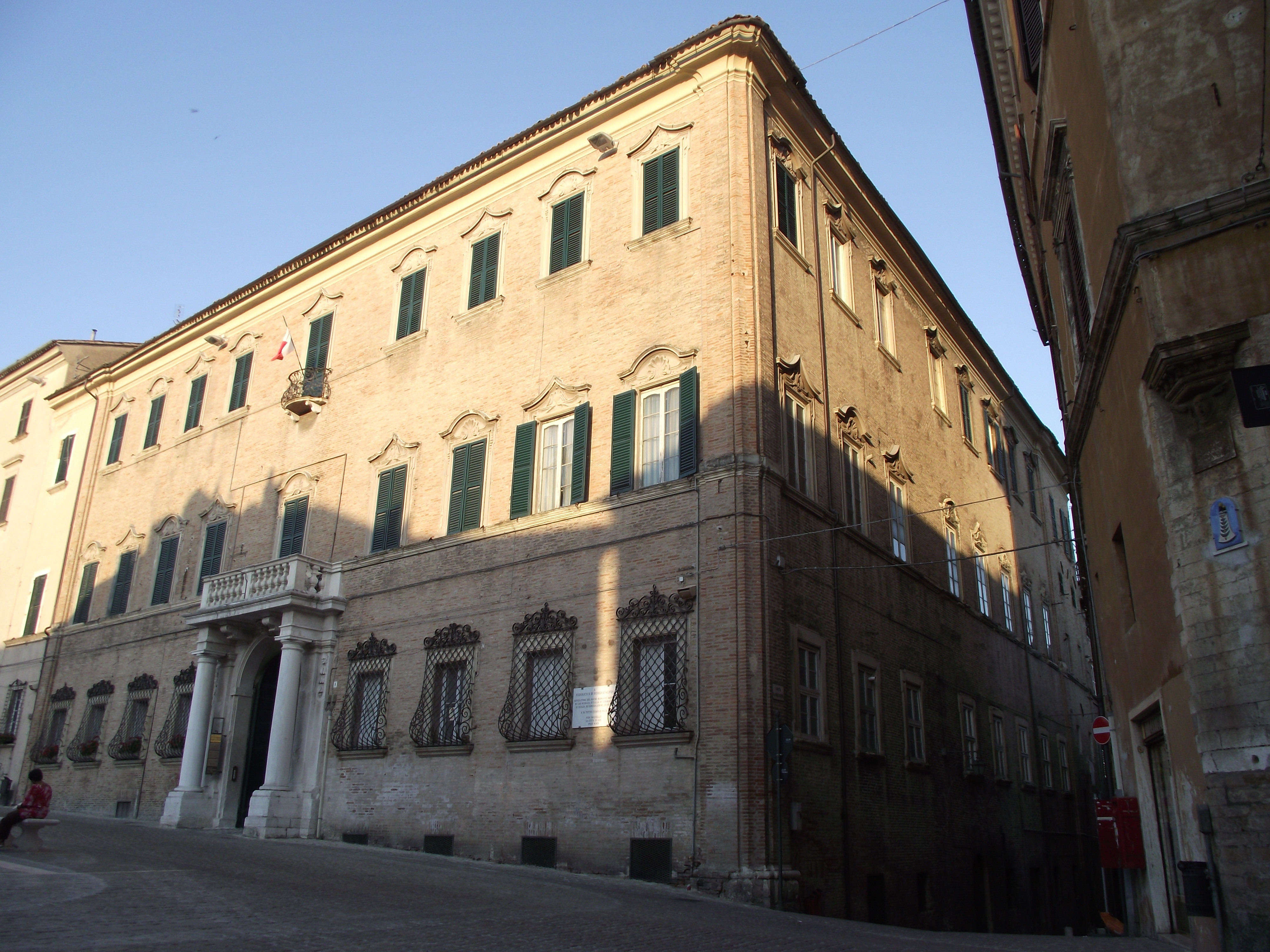 Jesi, Piazza Federico II, Palazzo Ripanti, XVIII secolo